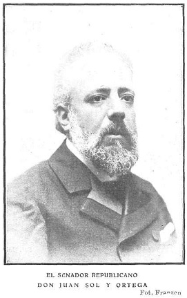 Retrato del político Joan Sol i Ortega, obra de Christian Franzen, recogido en la revista española Actualidades.